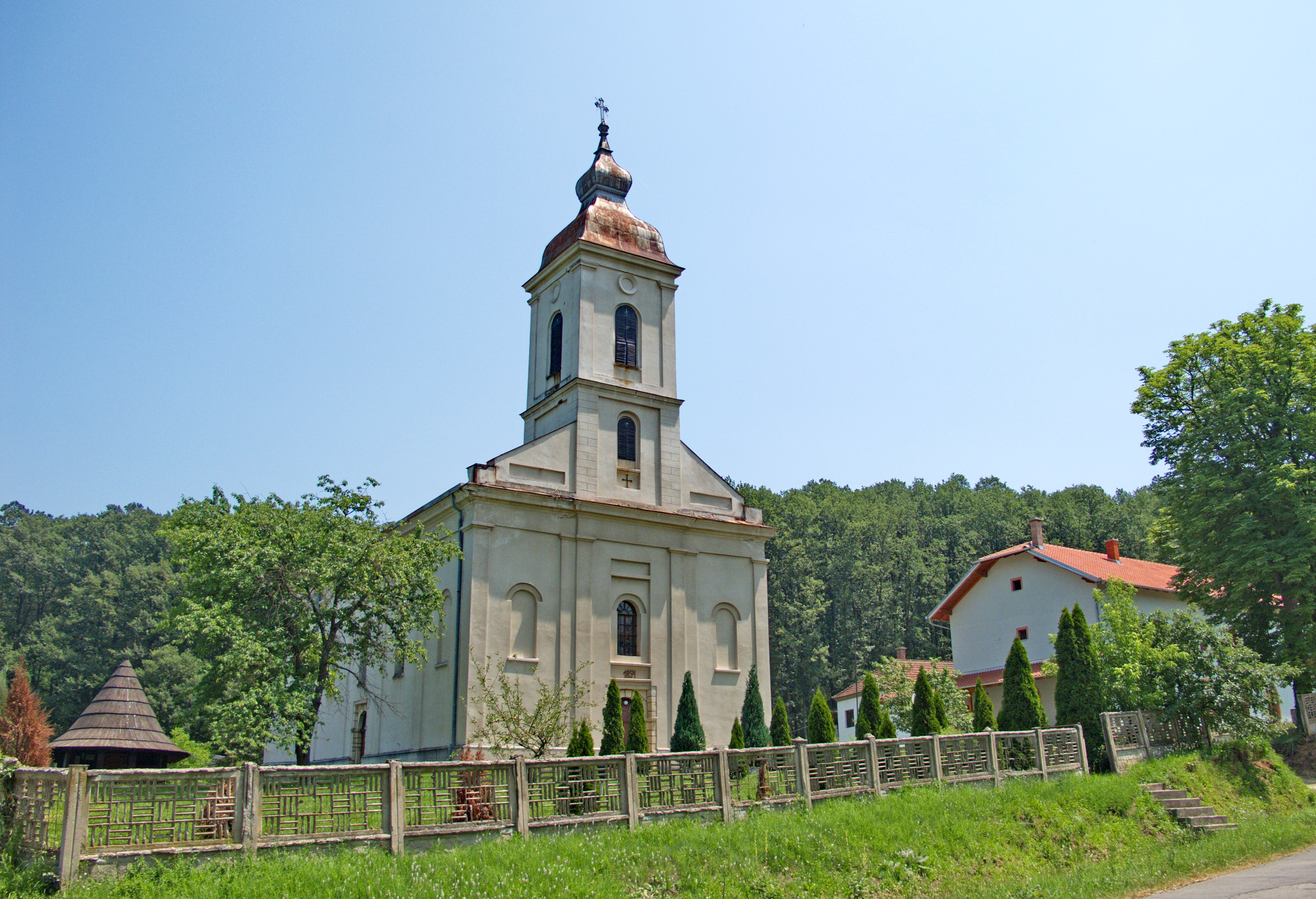 Manastir i crkva rođenja Bogorodičinog, Četereže, Žabari, iz XIX veka. Nova crkva podignuta je kraj stare crkve brvnare.